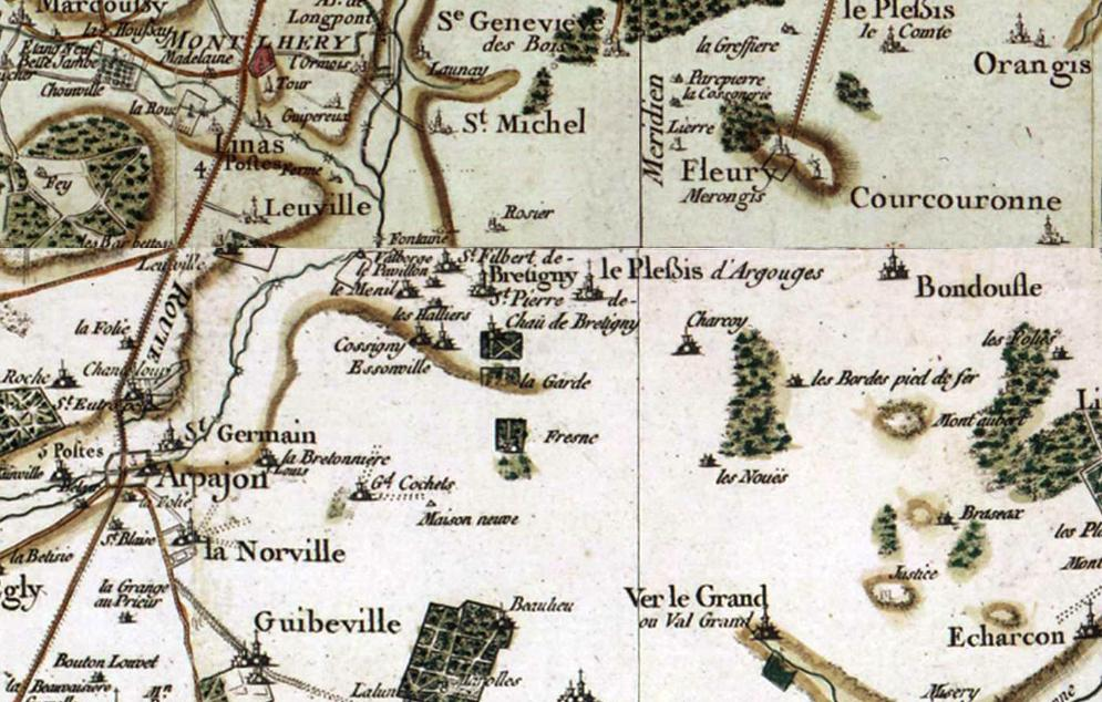 Carte de la région de Brétigny (91) au XVIIe siècle par Cassini